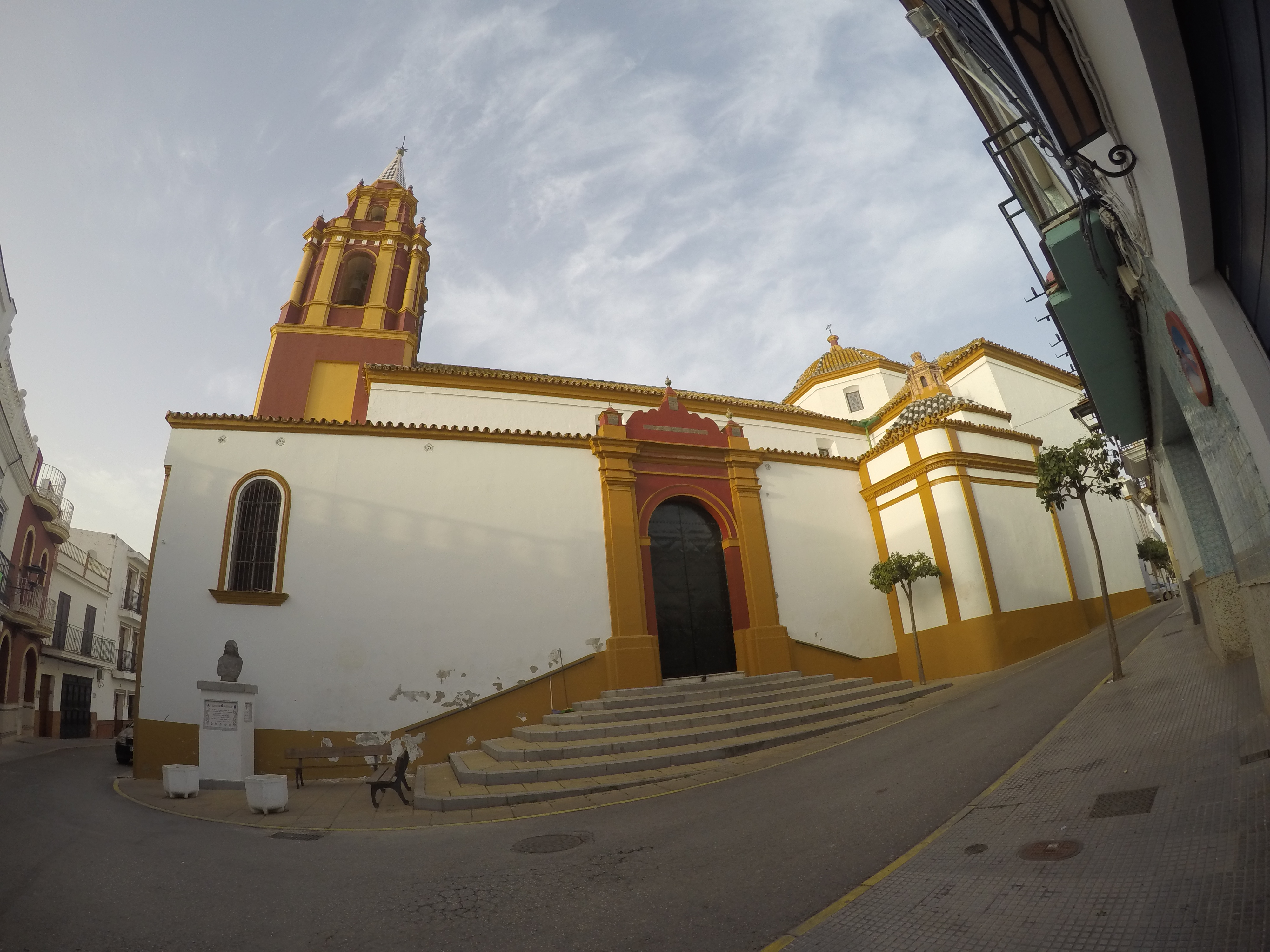 Fachada trasera con la torre y parte del edificio de la Iglesia - Parroquia Santa María La Blanca, en el punto más alto de la localidad. Vista desde la C/ Cristóbal Colón